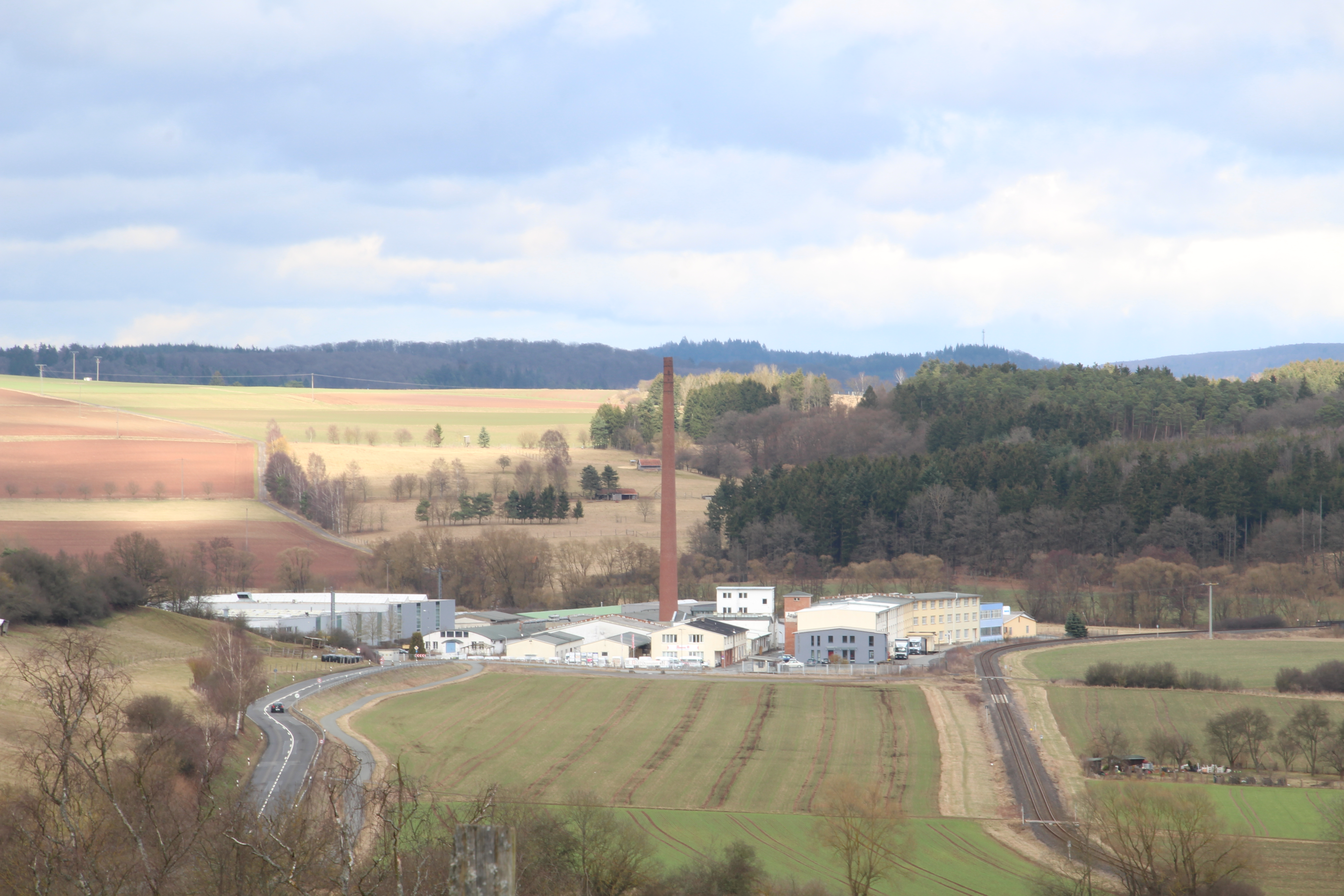 Siehe Bild und Dateiname